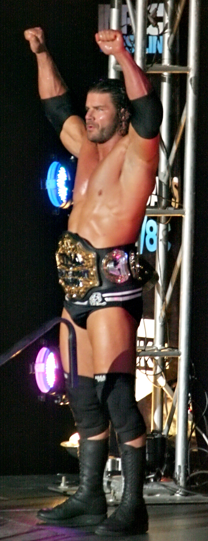 Robert Roode